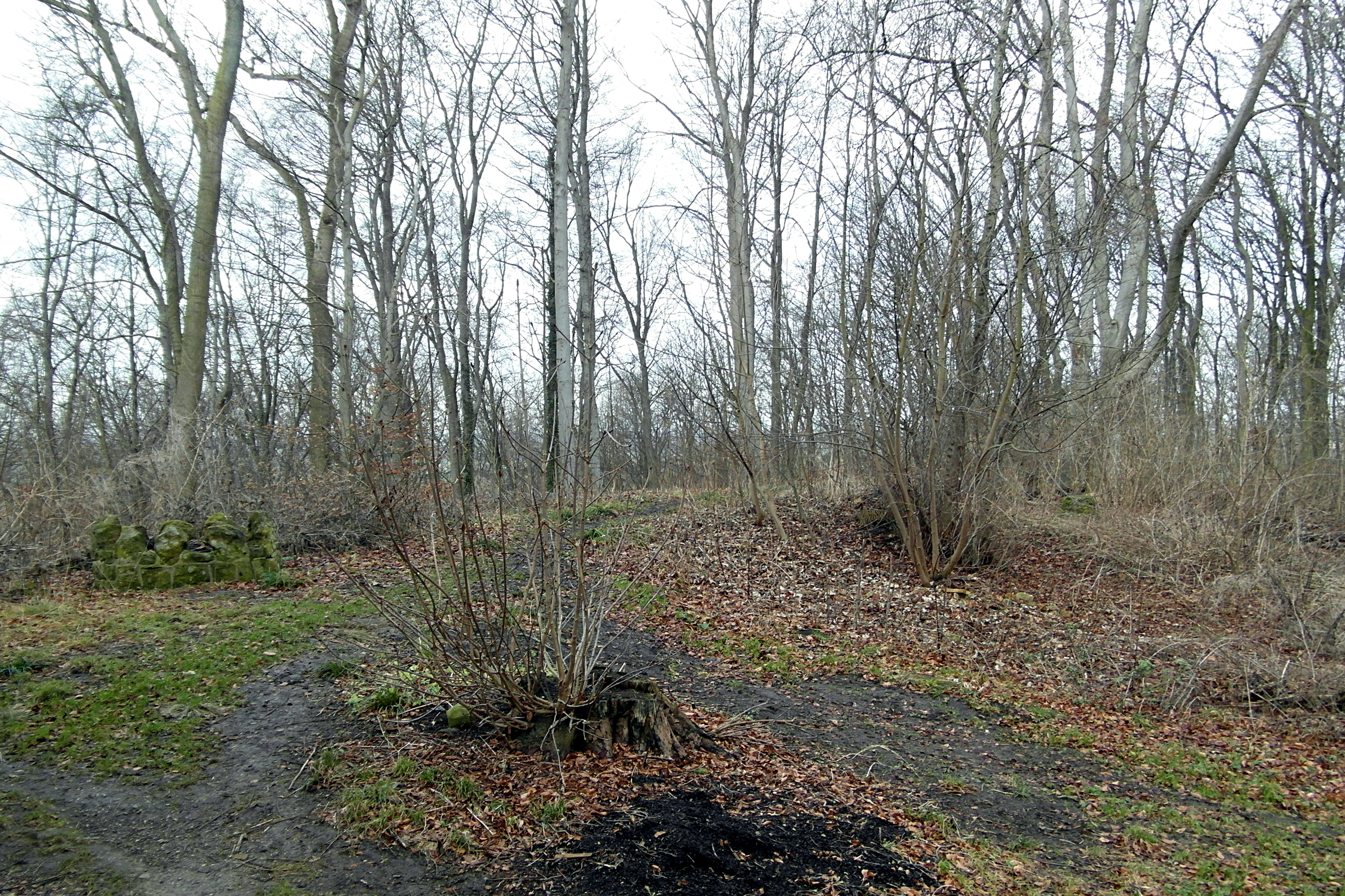 Dieser Erdhaufen etwa 15 m NNO des Burgbergturms ist der höchste Punkt des Burgbergs im Gehrdener Berg in der Region Hannover in Niedersachsen